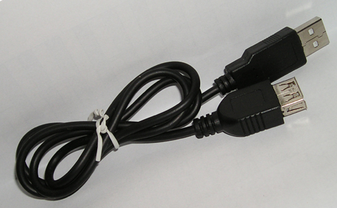 USB-Verlängerungskabel